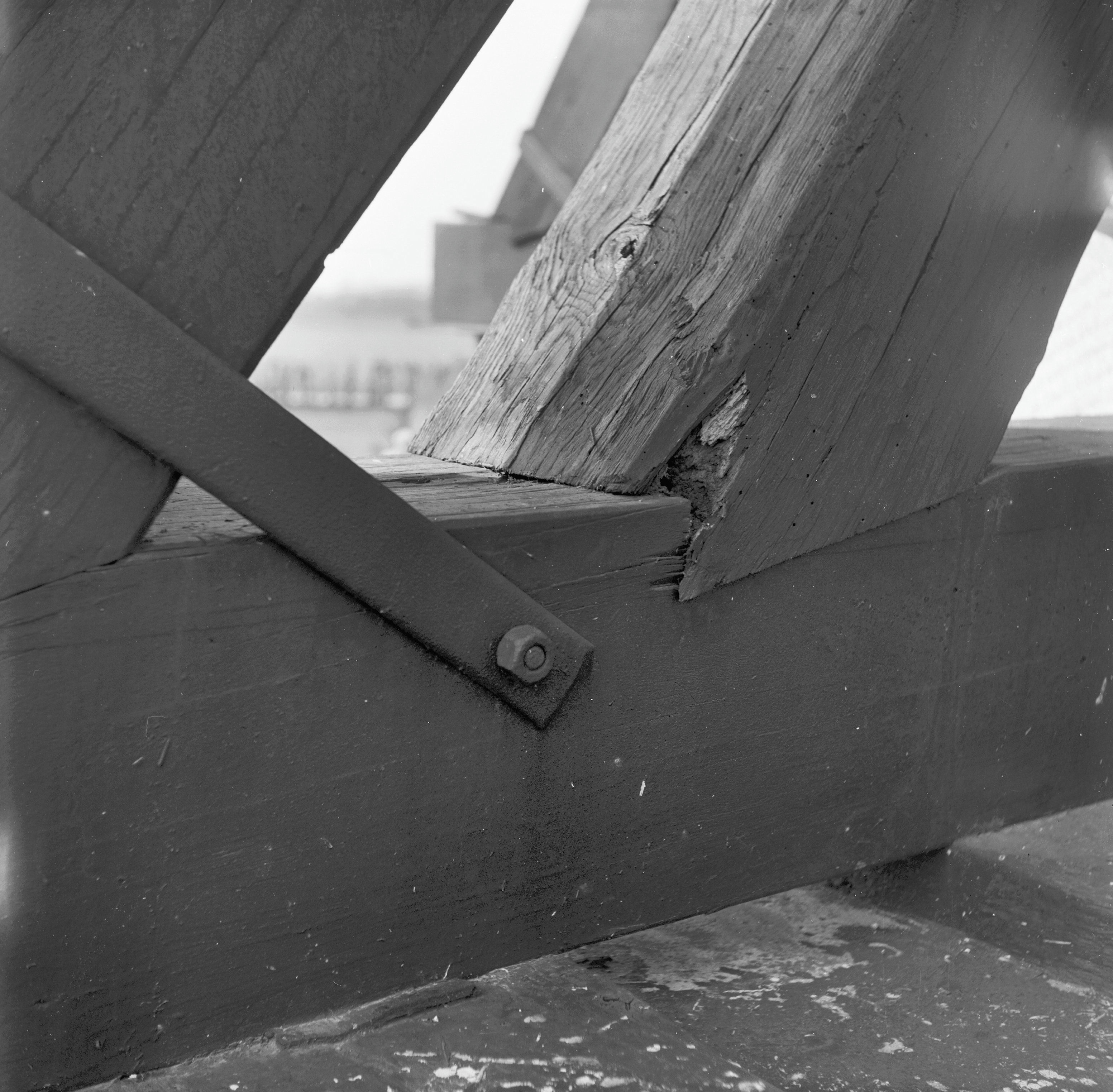 standerdmolen, kruisplaten en stukbanden